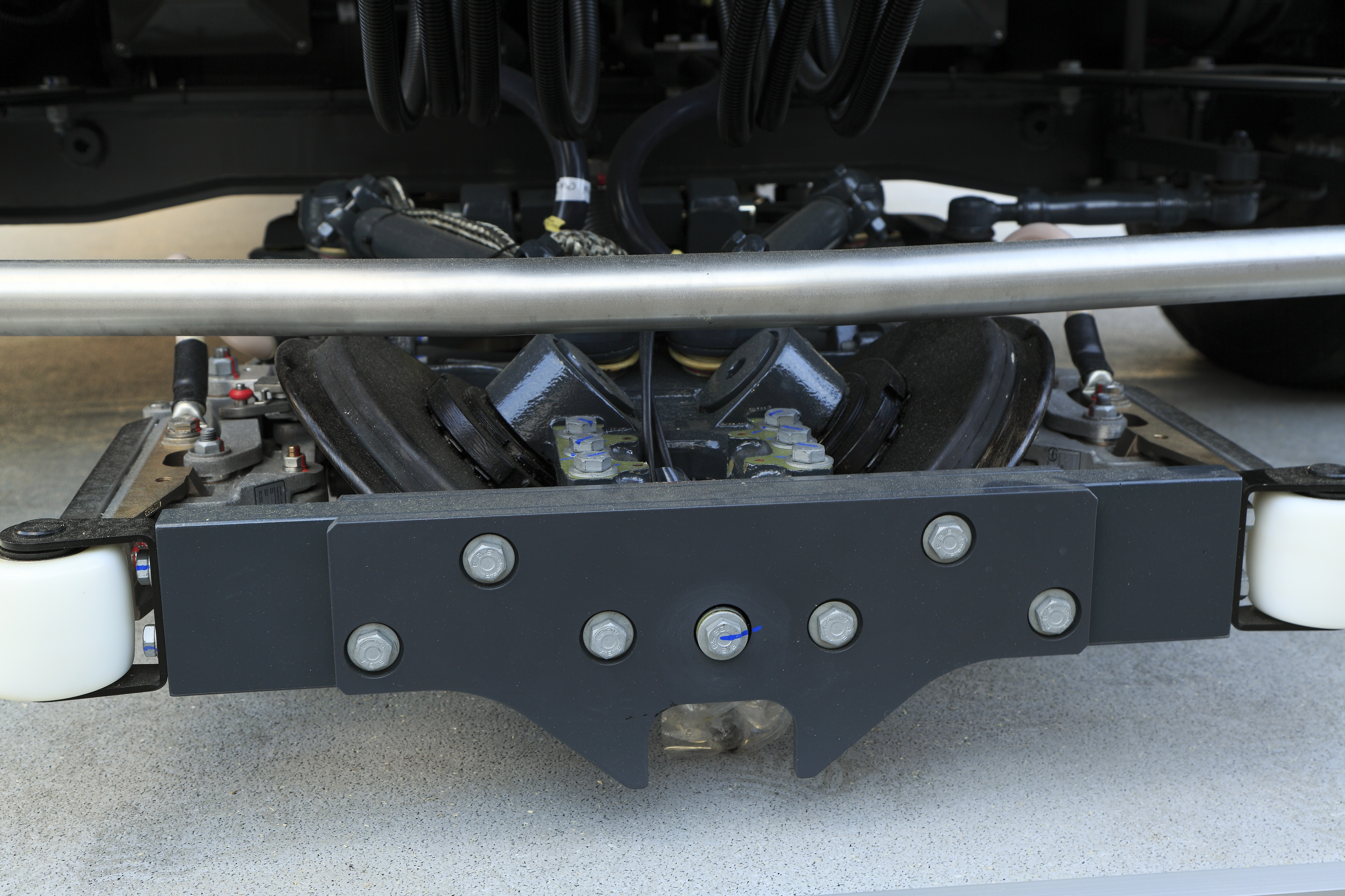 Die Führungseinrichtung entspricht dem System Translohr, jede Achse einer Einheit wird einzeln geführt. Die Führungsräder laufen auf den Flanken der Translohr-Leitschiene. Für das Bewegen der Wagen in Werkstätten ohne Leitschiene sind die Führungseinrichtungen anhebbar.